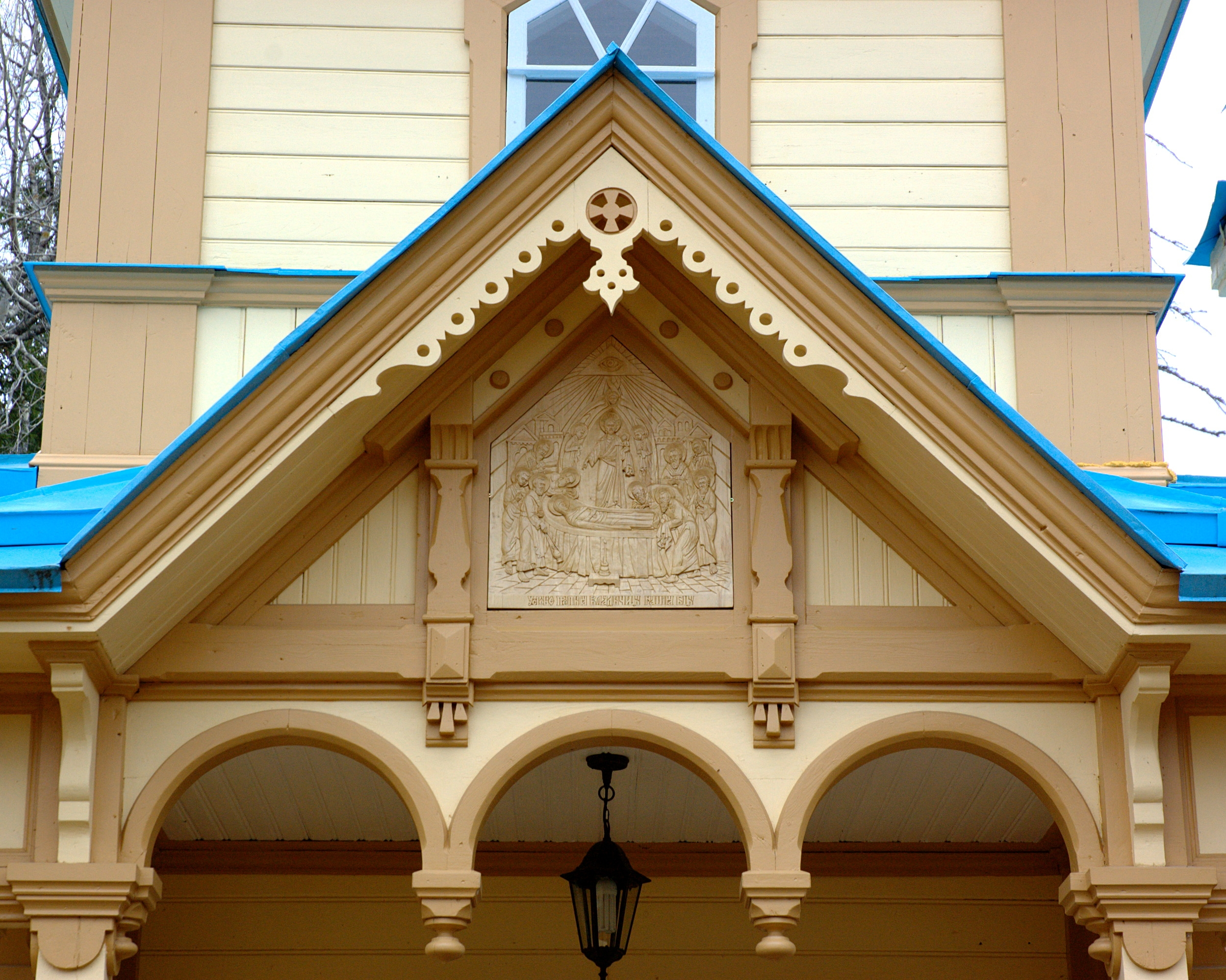 Успенская церковь (1911) Гефсиманского скита Валаамского монастыря. Фрагмент оформления парадного крыльца, икона Божьей Матери "Успение". Икона изображает смерть и погребение Марии, Иисус держит на руках душу Его Матери.